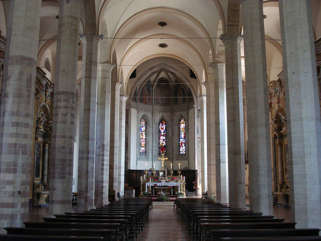 Interior da Igreja de S. Francisco, Gubbio